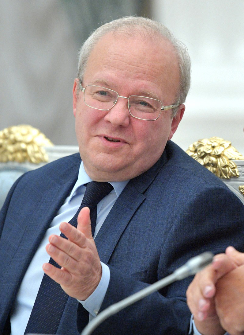 Проректор Московского государственного университета имени М.В.Ломоносова Алексей Хохлов во время встречи с Президентом России Владимиром Путиным